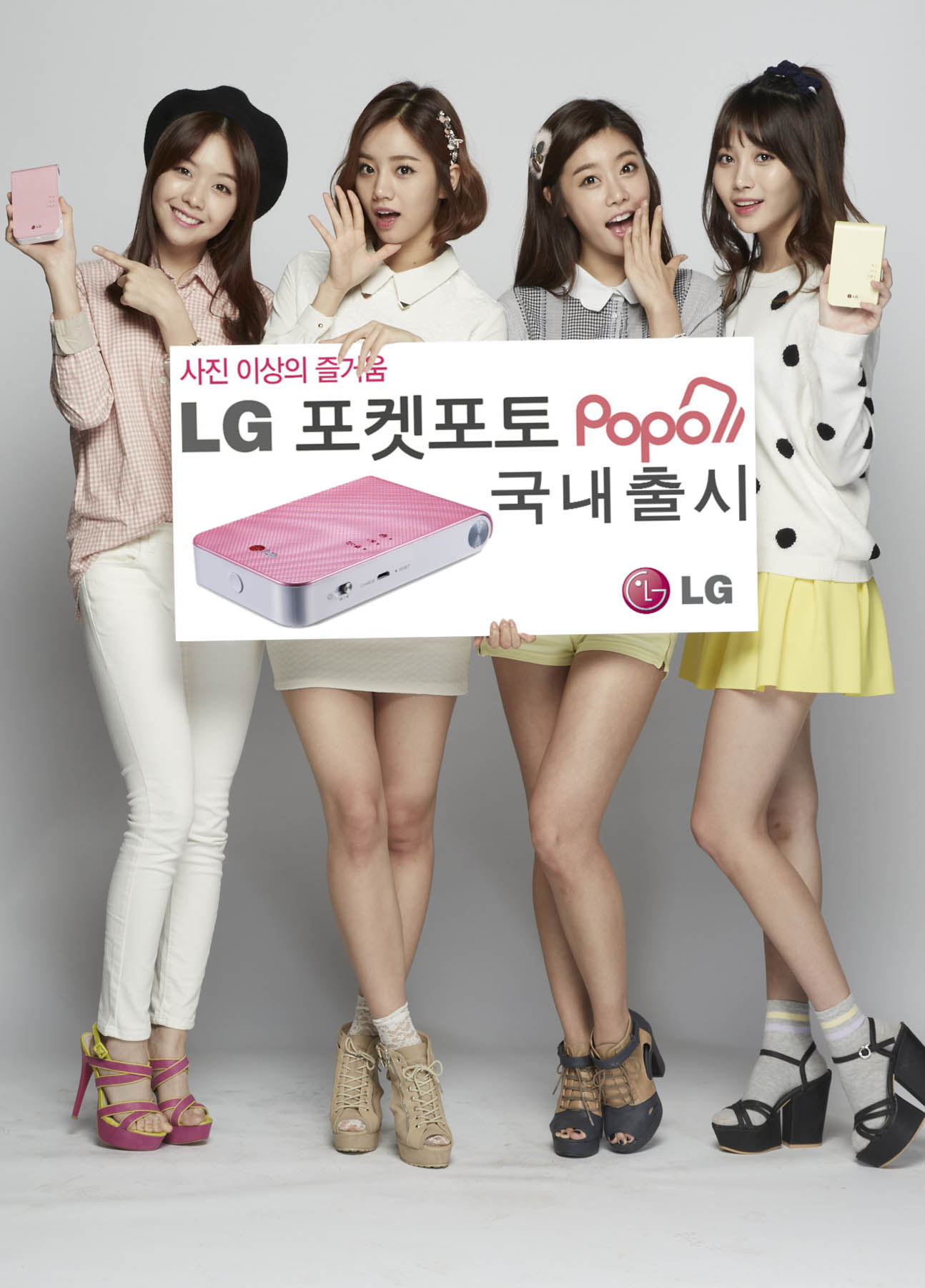 LG전자가 15일부터 초소형 모바일 프린터 ‘14년형 포켓포토’를 국내 시장에 출시한다. LG 포켓포토 공식 모델인 '걸스데이'가 제품을 들고 포즈를 취하고 있다. ※ Social LG전자 에서 관련 보도자료를 확인하실 수 있습니다.